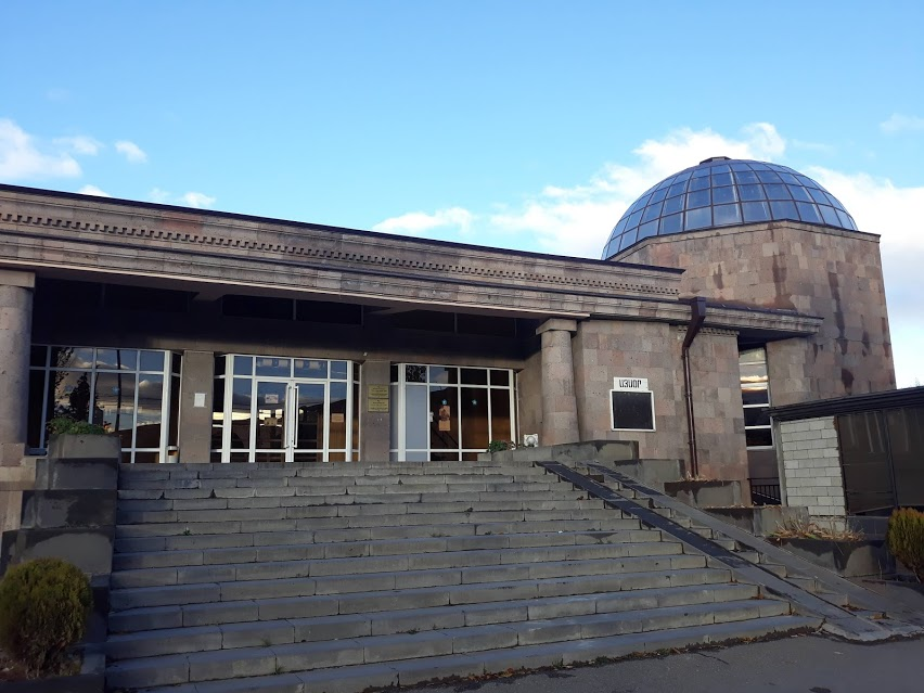 Սպիտակի մշակույթի տուն